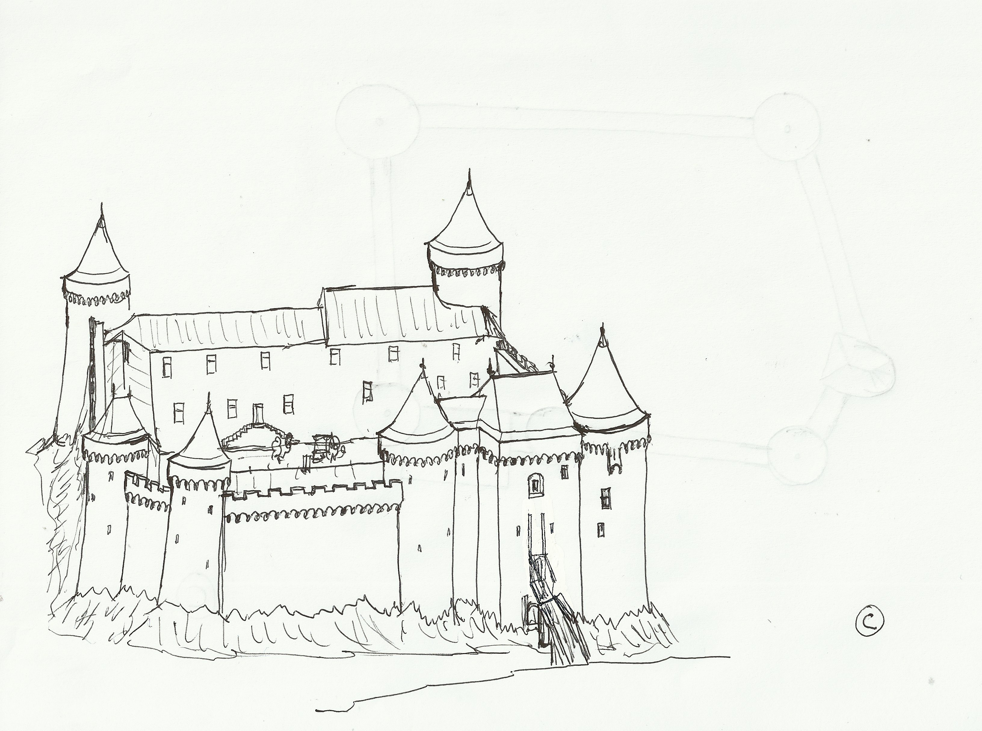 Croquis représentant une reconstitution possible du château médiéval de Machecoul.